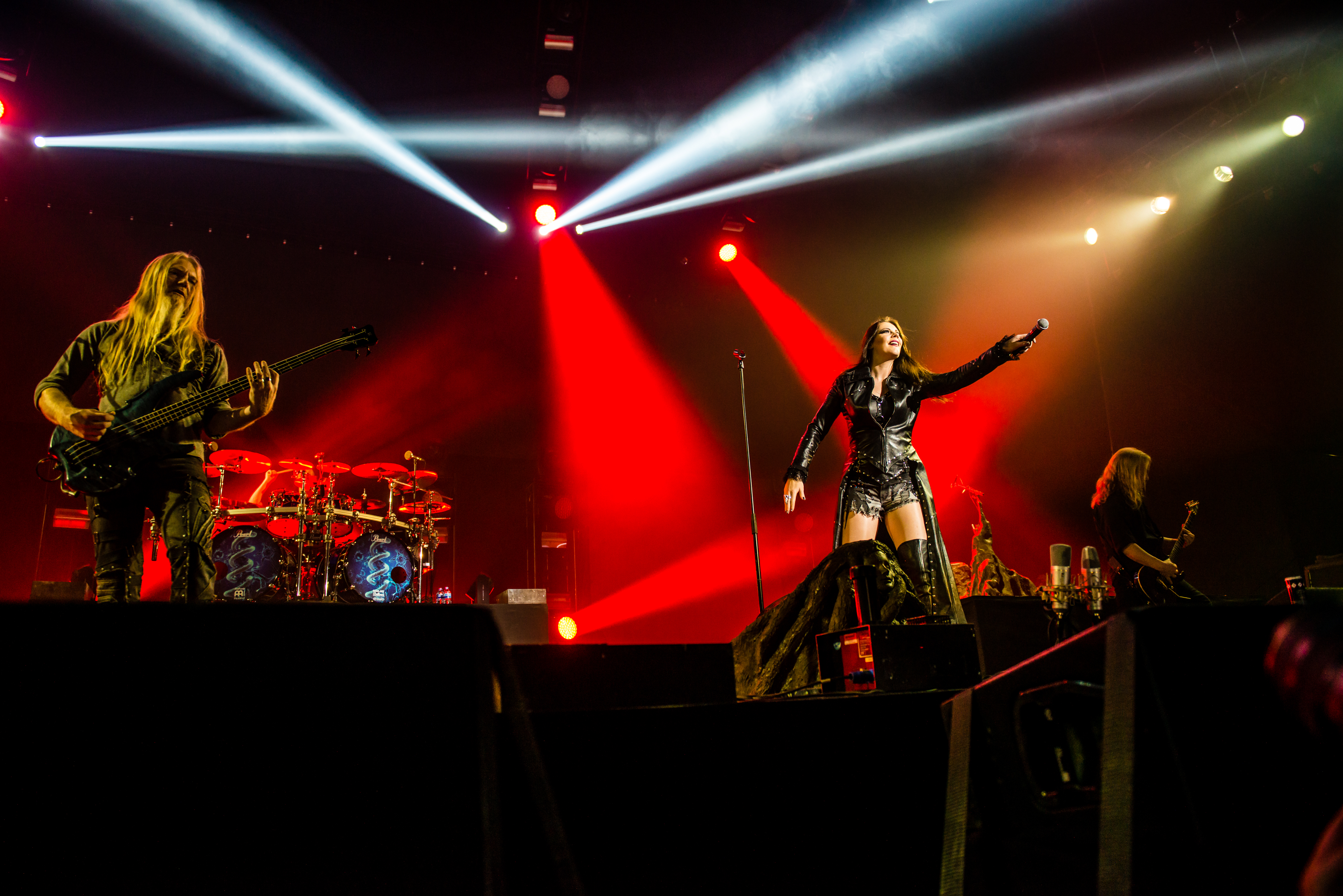 'Nightwish Endless forms most beautiful Tour 2015 Oberhausen'